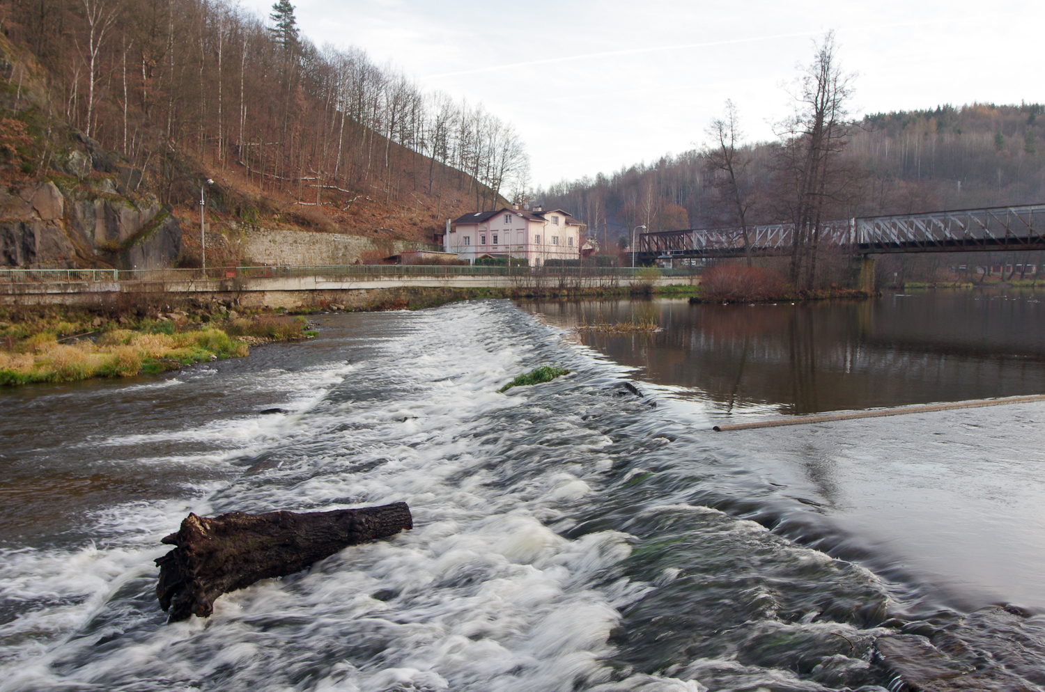 Ohře v Lokti, dolní jez